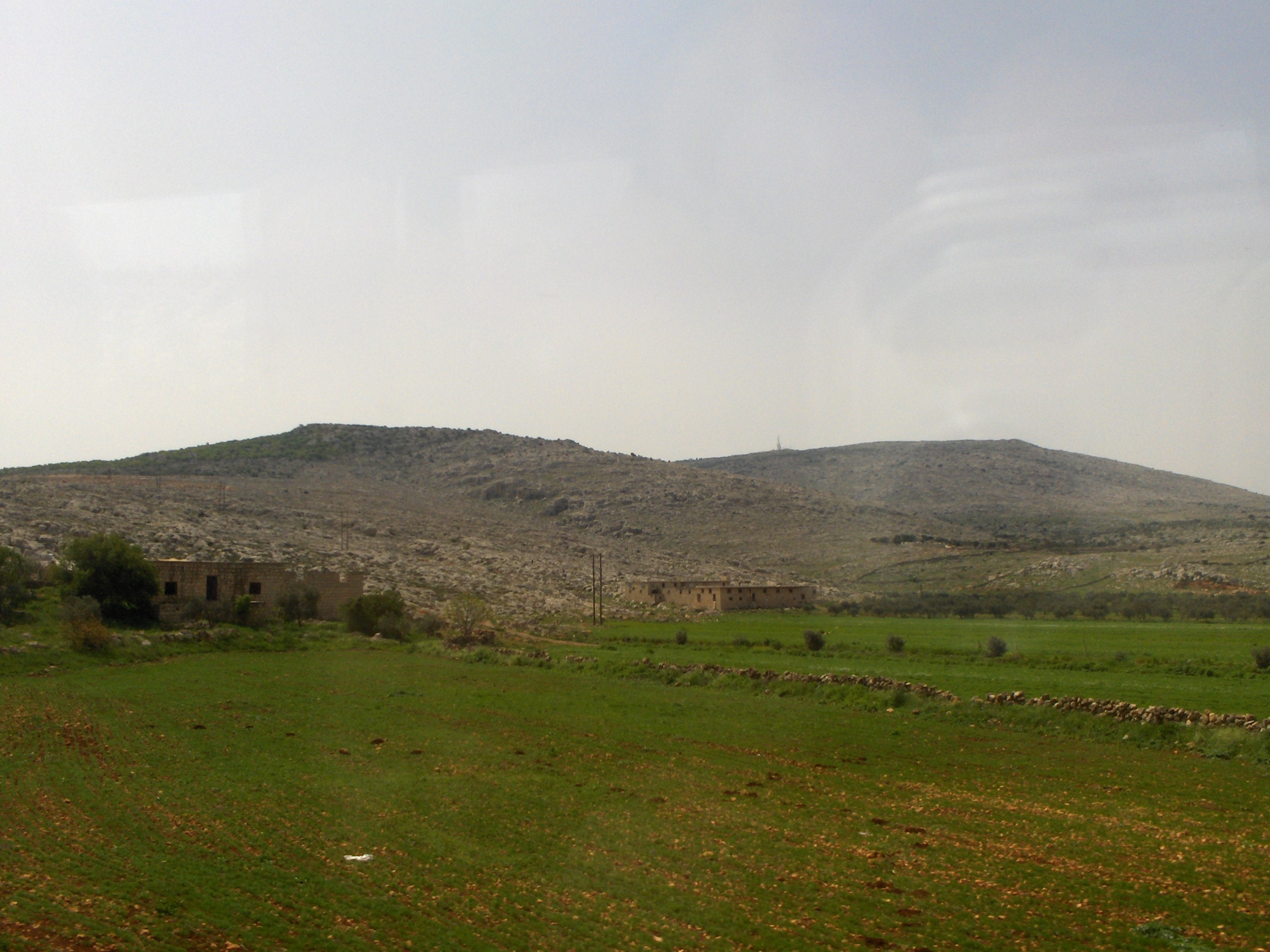 Colline intorno ad Aleppo, Siria